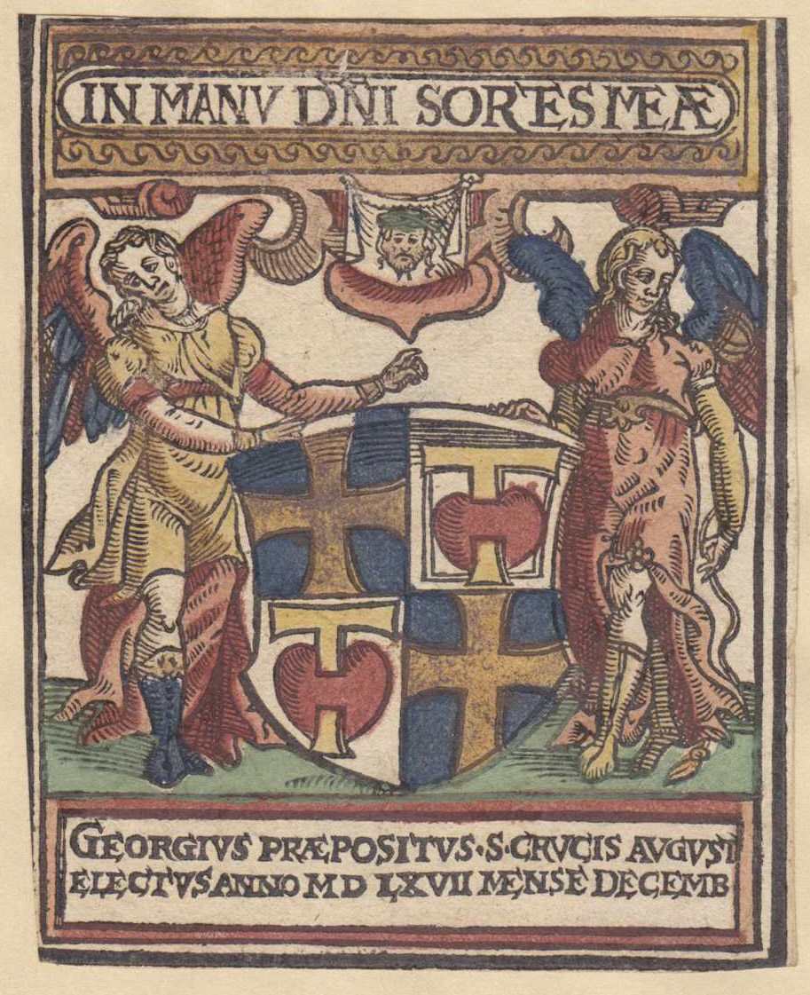 Ex libris, Augustinerchorherrenstift Heilig Kreuz, Augsburg, Propst Georg Faiglin (Feiglius), 1567–1572